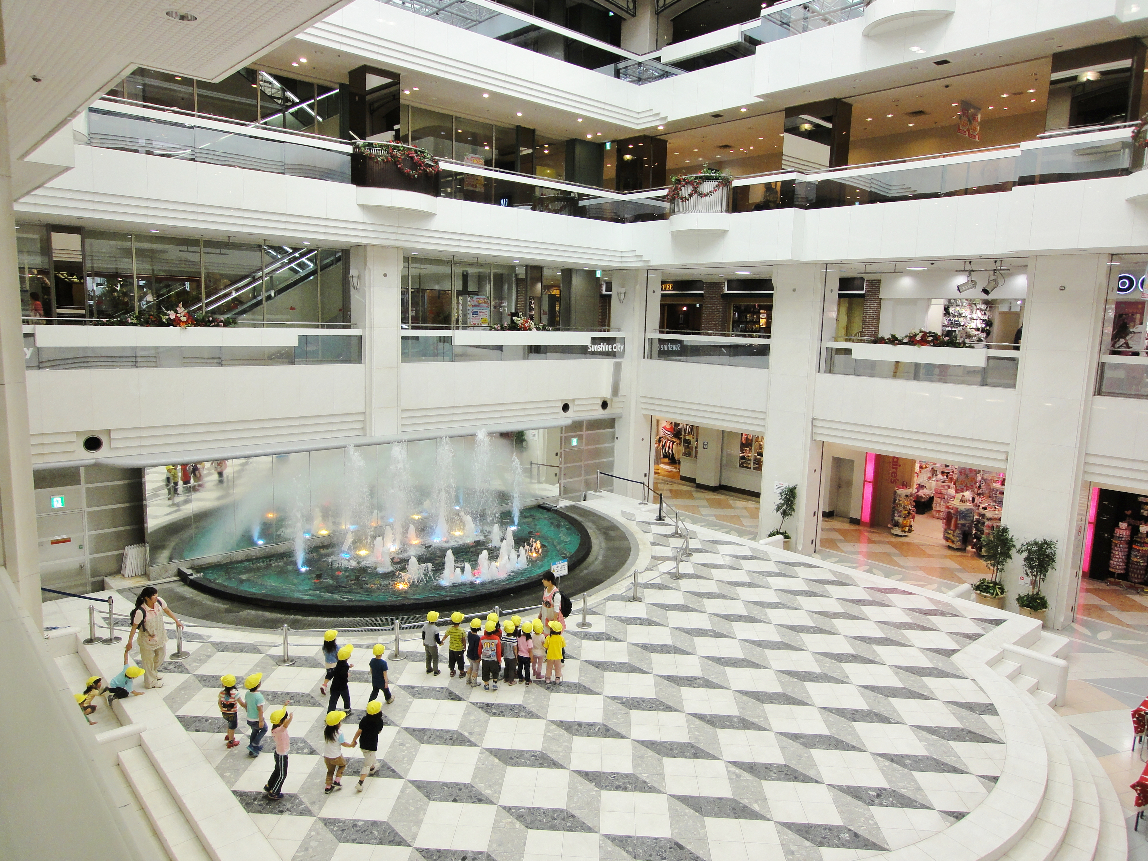 Sunshine City Atrium サンシャインシティ 専門店街アルパ